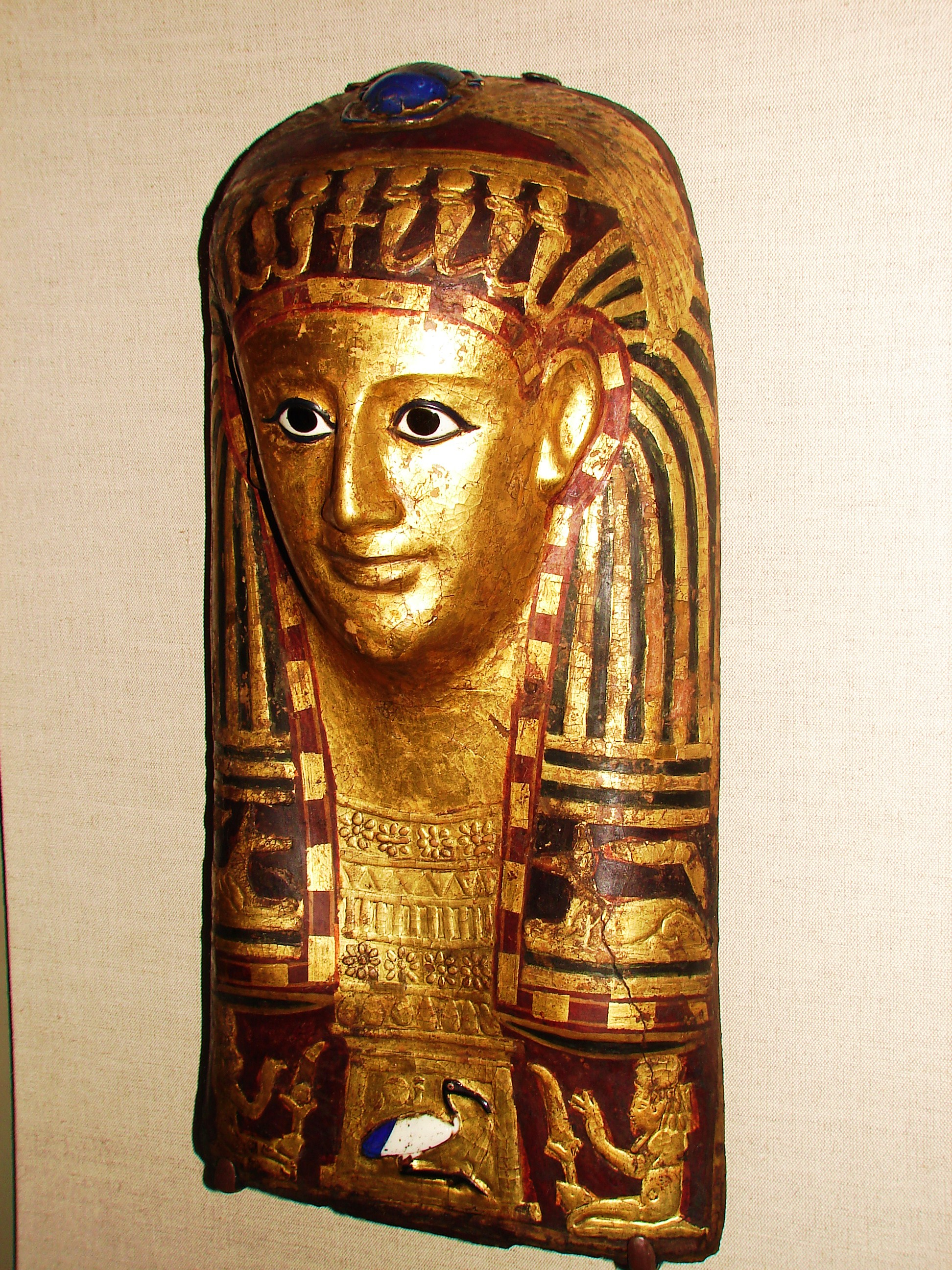 ഈജിപ്ഷ്യൻ മമ്മിയുടെ മുഖാവരണം- വാൾട്ടേഴ്സ് ആർട്ട് മ്യൂസിയിയത്തിലെ ശേഖരത്തിൽ നിന്നും